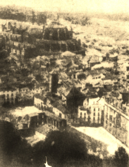 Fotografía de Plaza Nueva (Granada) tomada antesantes de 1869.